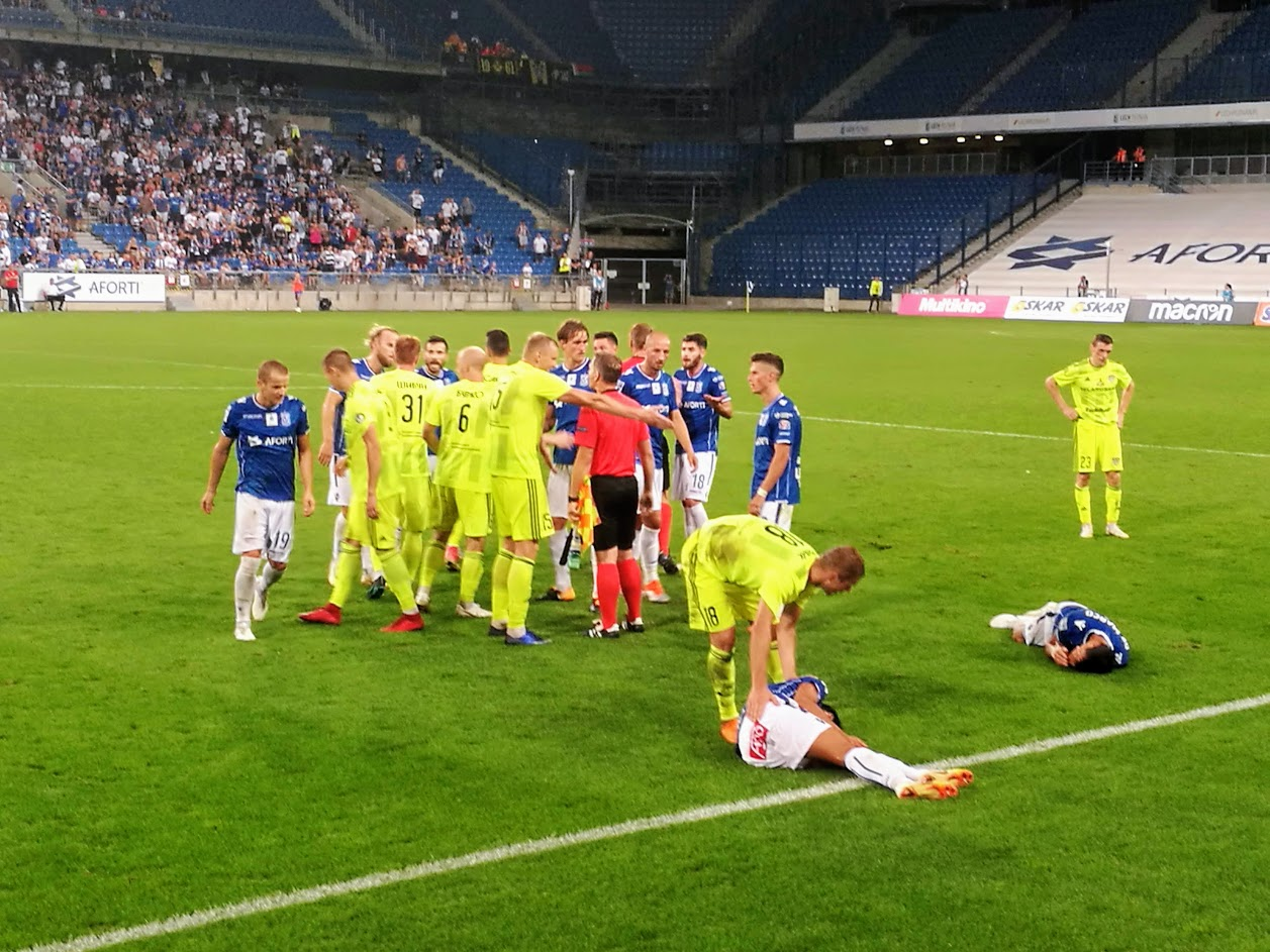 Kadr z meczu II rundy eliminacji Ligi Europy Lech Poznań - Szachcior Saligorsk (Szachtior Soligorsk), rozgrywanego 2 sierpnia 2018 r. w Poznaniu, zakończonego wynikiem 3:1 (1:1 w czasie regulaminowym). W ostatnich minutach dogrywki 2 zawodników gości zostało ukaranych czerwonymi kartkami.